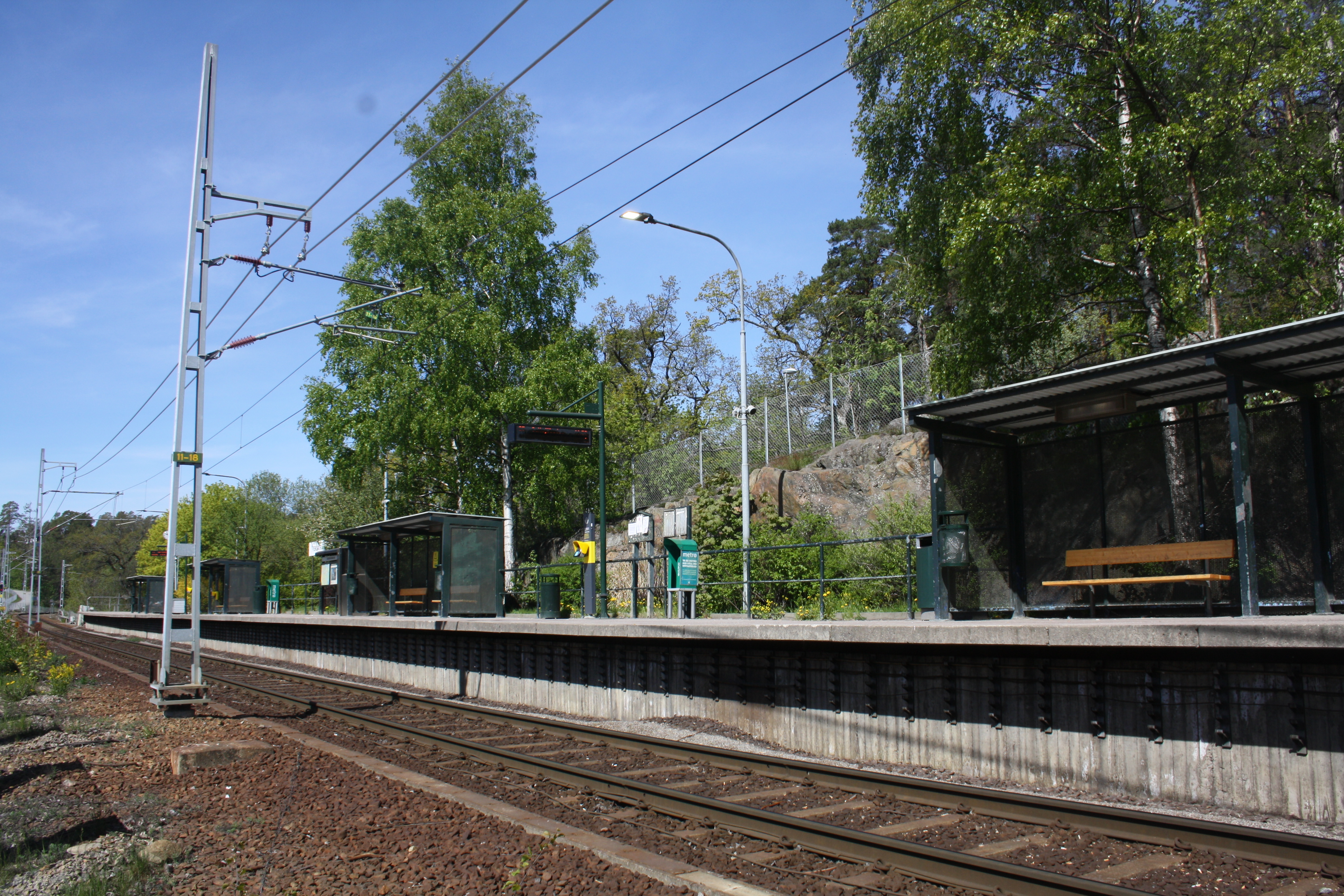 Fisksätra